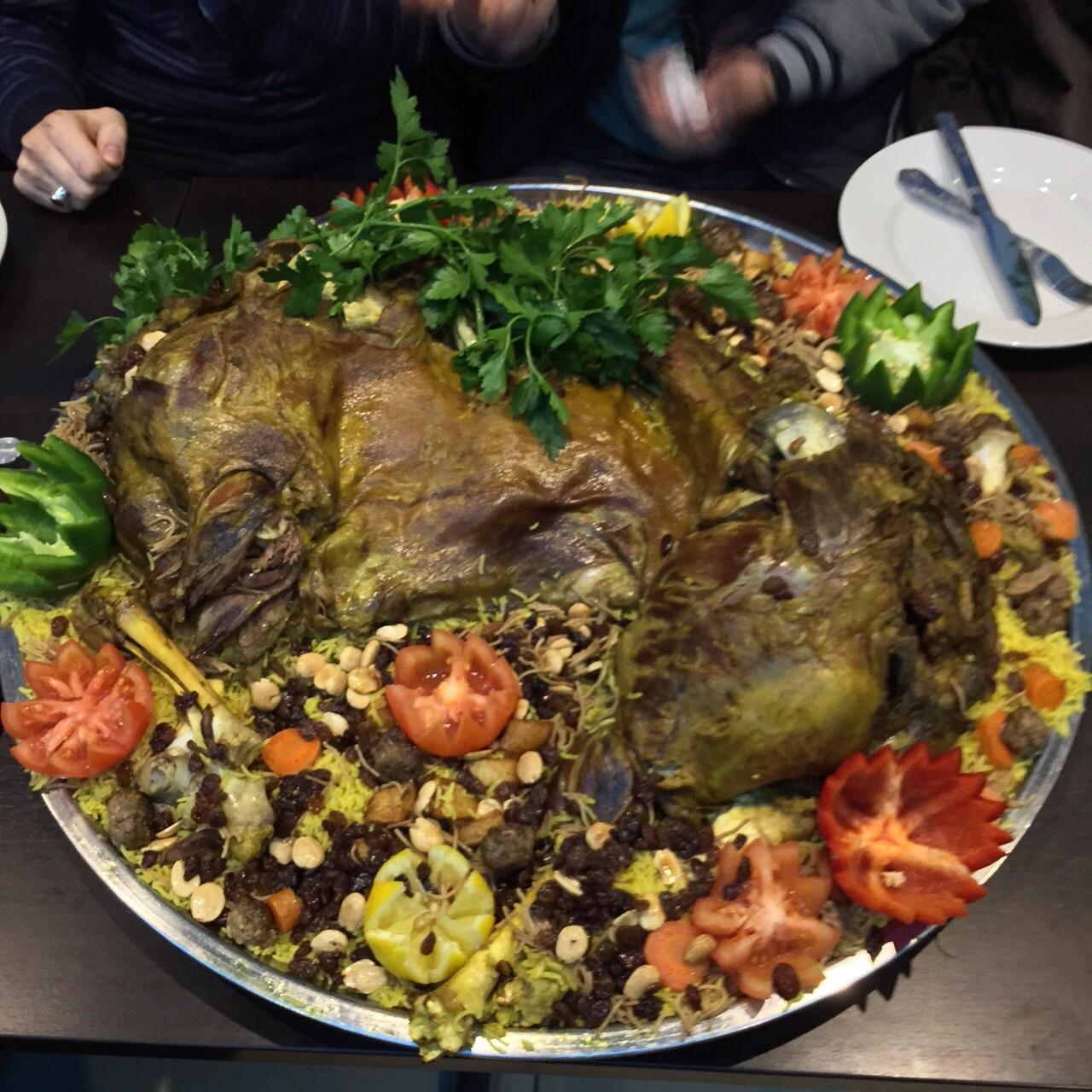 Iraqi Qoozi or mfatah مفطح، one of the main Iraq's national dishes صحن قوزي او مفطح عراقي أحد أشهر الاكلات العراقية التي تطبخ في المناسبات كالأعراس والمناسبات الدينية